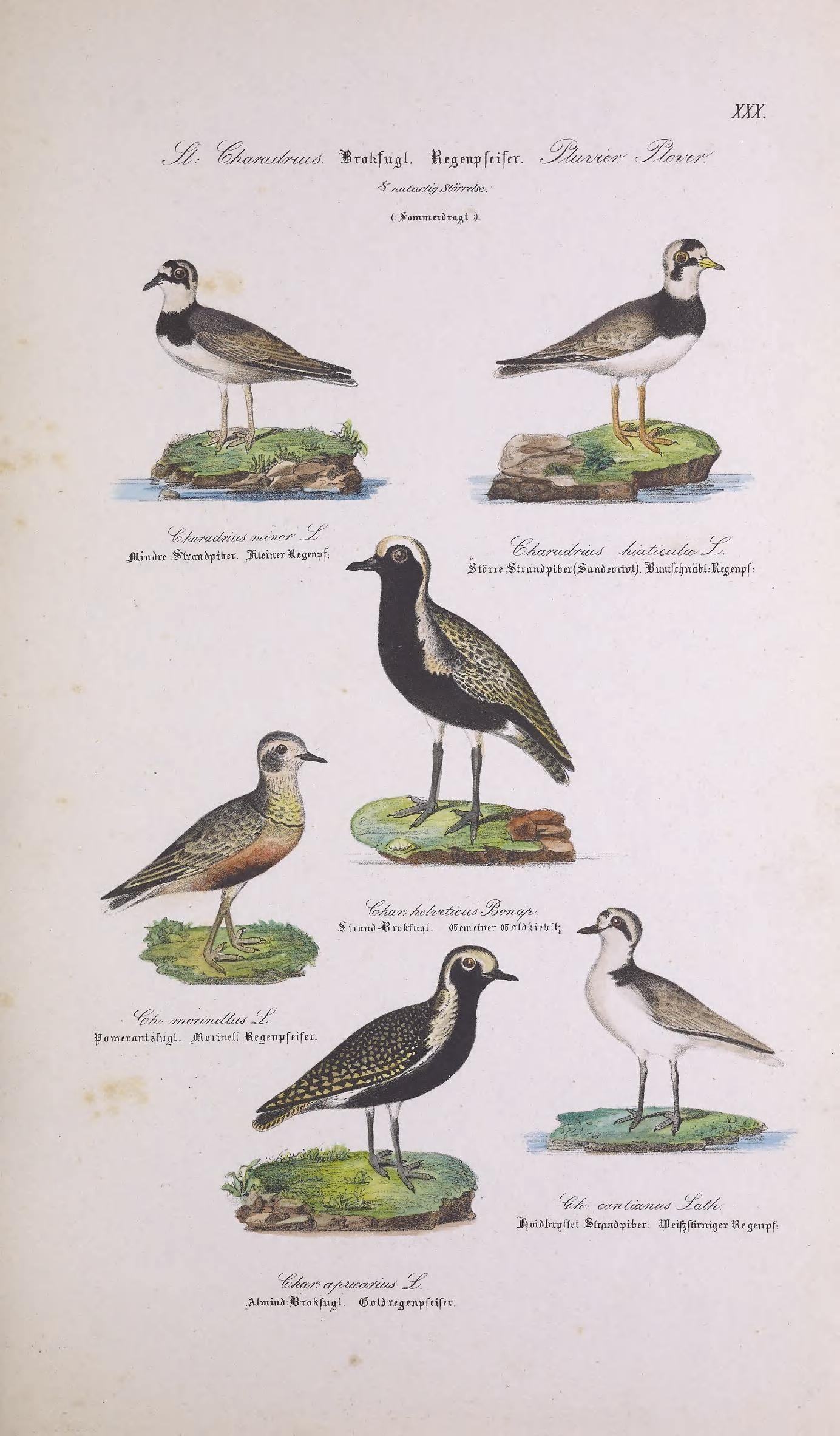 XXX (■ &ommttbra.g l t ; ) ttø?*/ JliuJw Slrrnityib« Rimter tegen? f ; Sfrnrttl-Brøftfiml. røemrtnrr ©øidfcip&if; J^milixgpef Strandpiber. Wet(